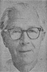 Arkitekten Simon Brofelth